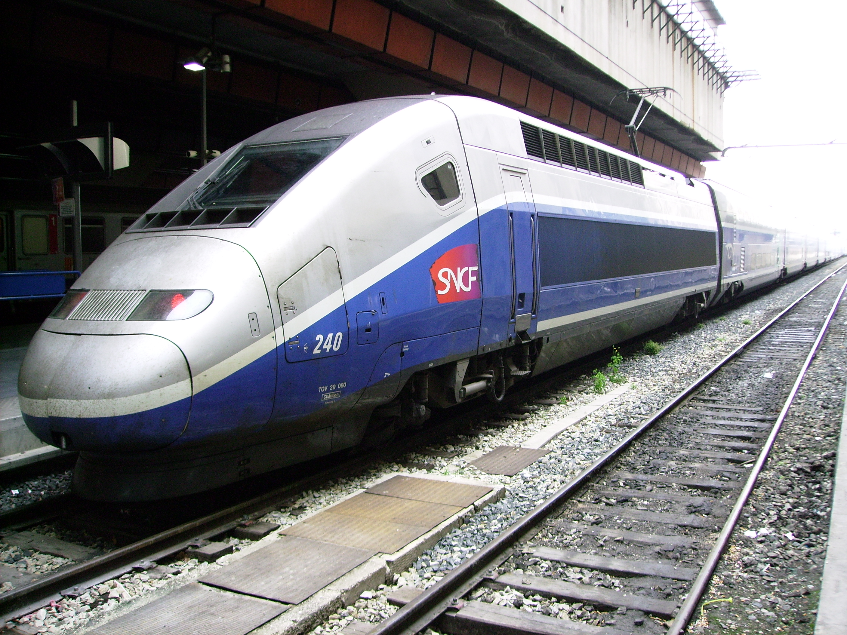 Tgv at Marseille (France)